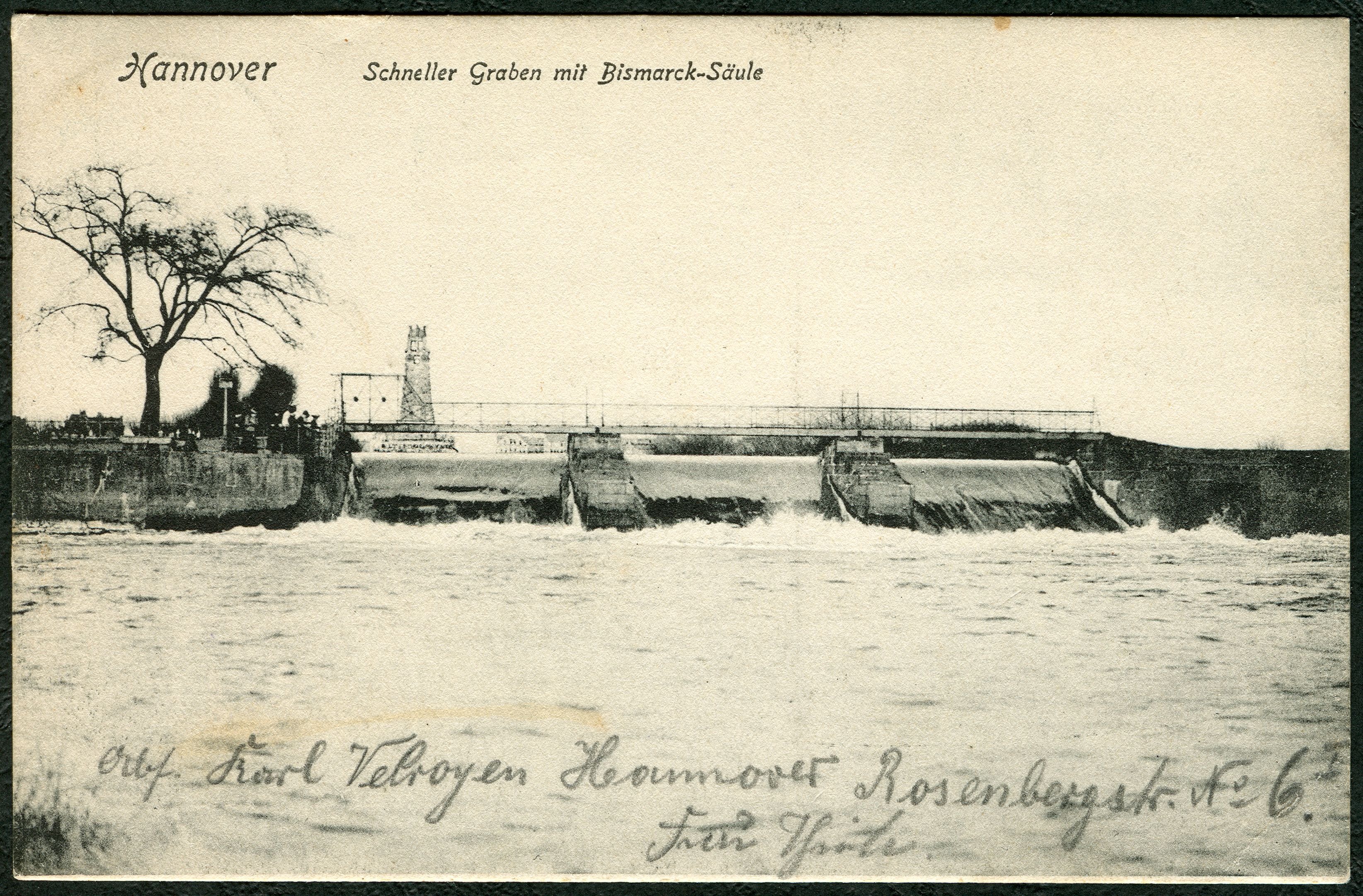 Blick über den Schnellen Graben zur Bismarck-Säule, im Vergleich mit ähnlichen, späteren Ansichten noch ohne die im Hintergrund bis 1906 erbaute Bismarkschule ...